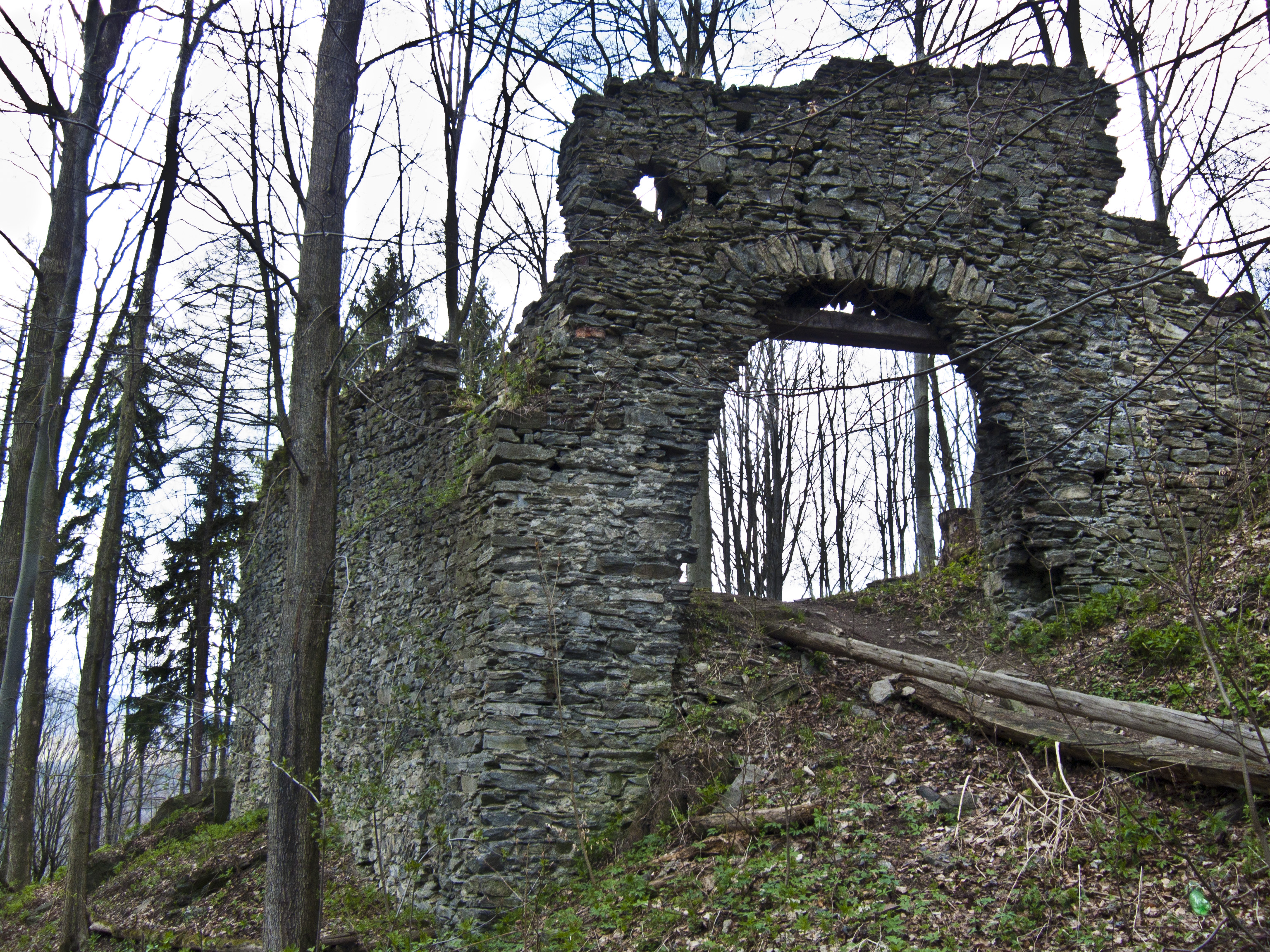 Nový Hrad u Hanušovic - třetí brána